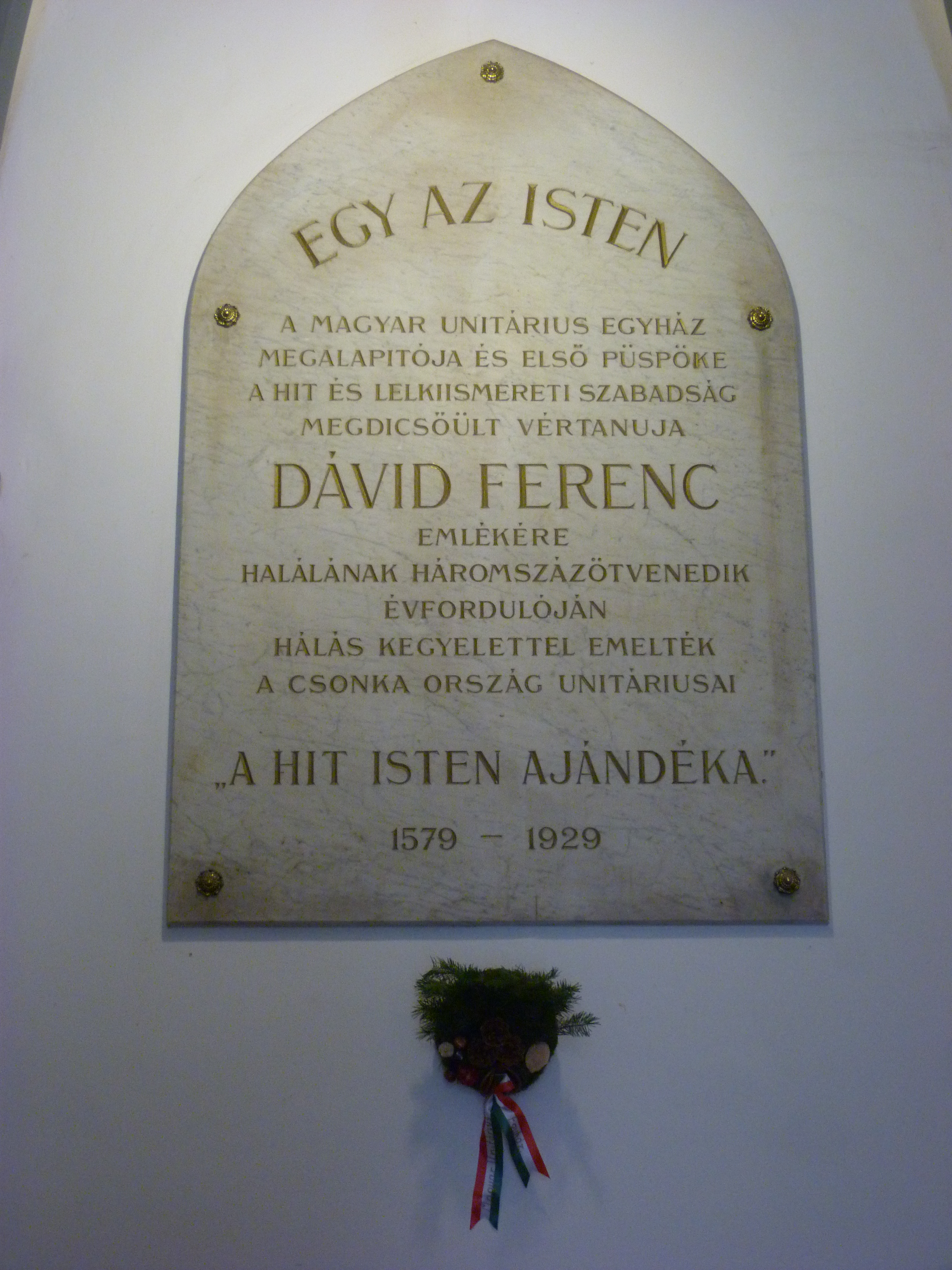 A felvétel 2014. december 14-én készült. Budapesti Unitárius Egyházközség, Belváros. Nagy Ignác utca 2-4 szám. Dávid Ferenc emléktáblája. ©© Derzsi Elekes Andor, Budapest, 2014, A kép egészben, vagy részletekben másolását, bármilyen úton történő sokszorosítását és felhasználását a szerző ellenérték nélkül, jogutódjaira is kihatóan megengedi. Az engedély kiterjed a kereskedelmi célú hasznosításra is. Kéri azonban nevének feltüntetését a felhasználás során. A Metapolisz sorozat valamennyi képe és filmje Creative Commons alatti valamint kereskedelmi - for profit - célra is felhasználható. Ajánlott hivatkozás: Derzsi Elekes Andor: Metapolisz DVD line